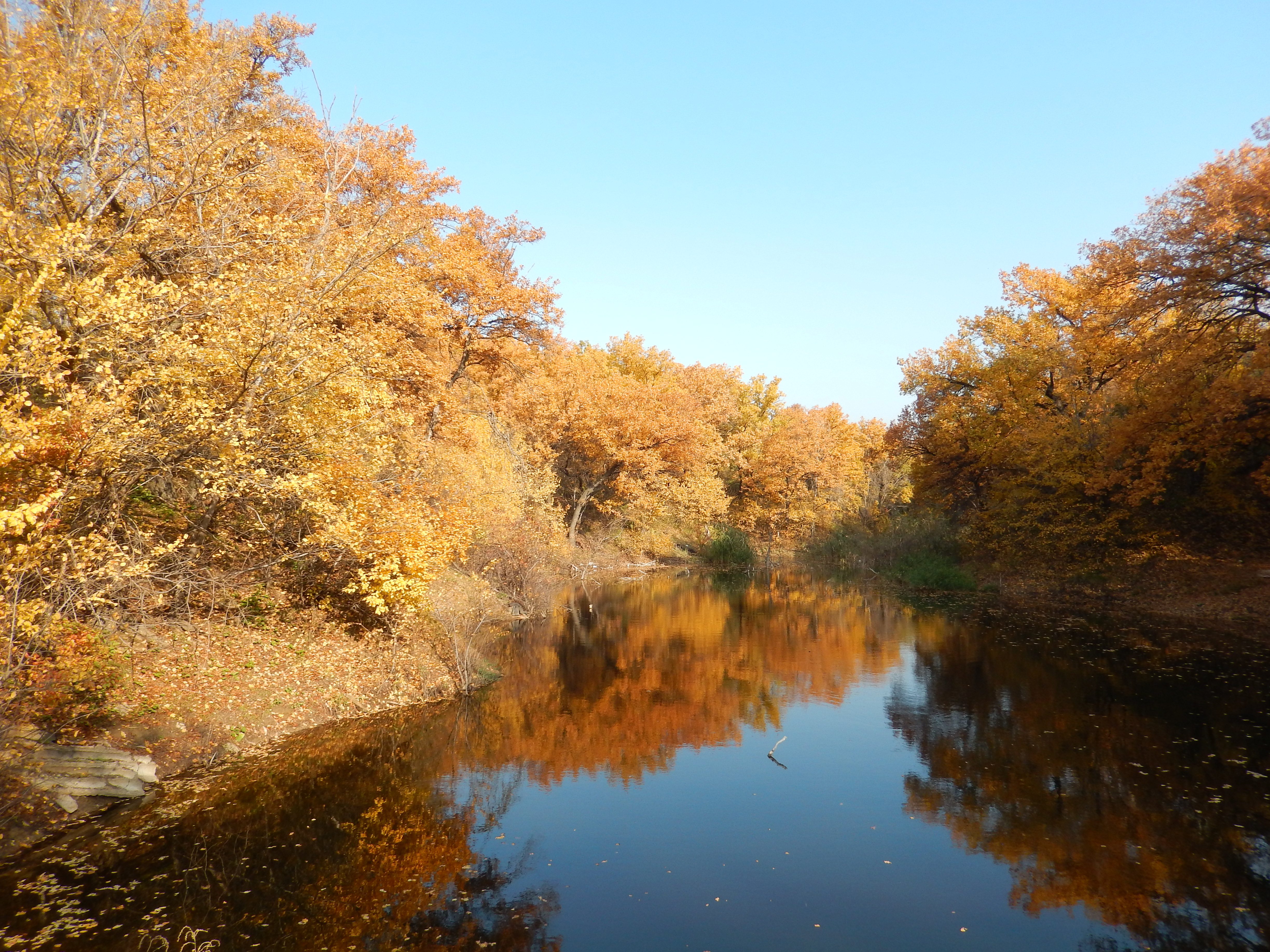 Дубовая роща, Тракторозаводский район, Волгоград